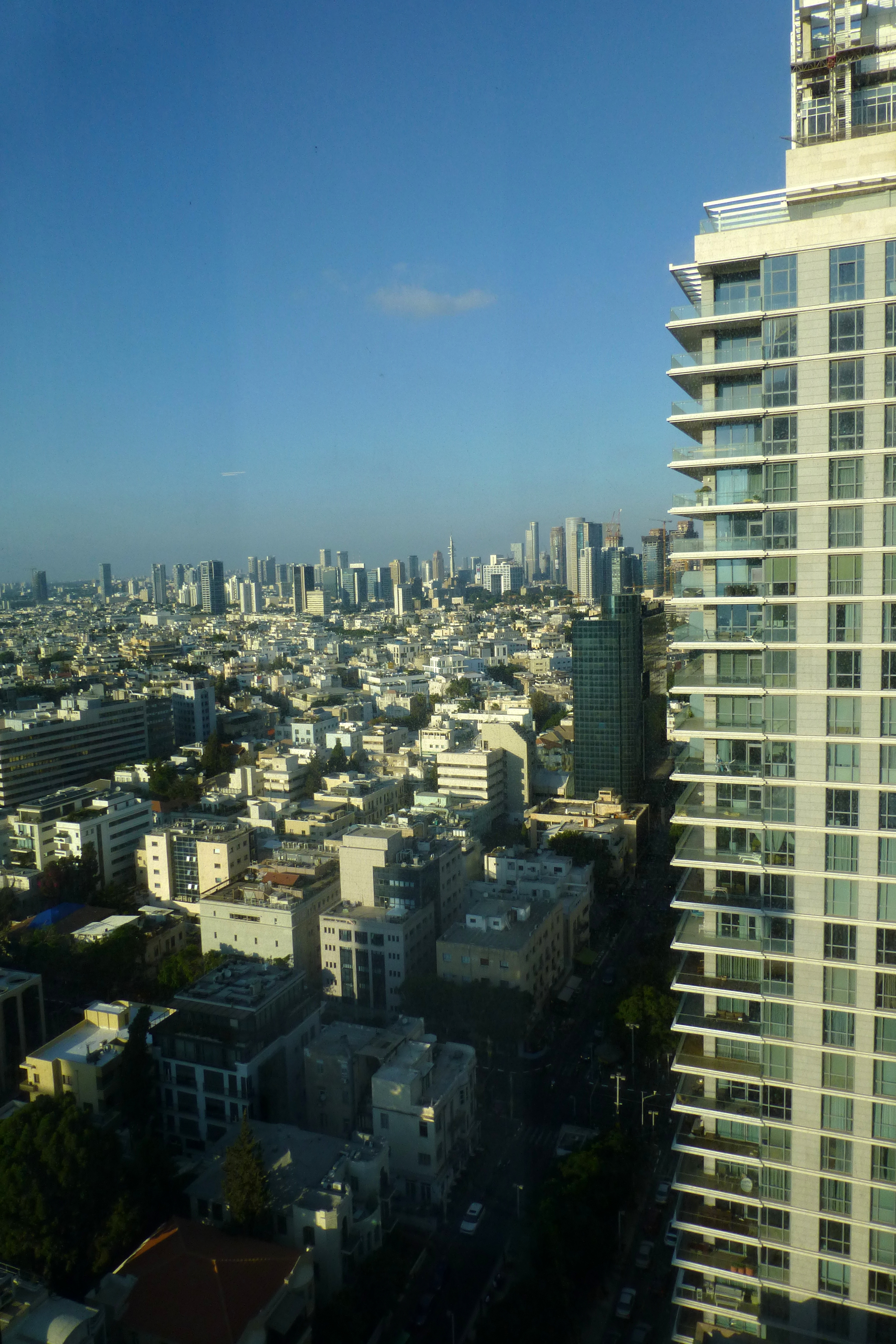 שדרות רוטשילד היו בין ארבעת הרחובות הראשונים של תל אביב (שנקראה אז "אחוזת בית"), שנחנכו לאחר רחוב הרצל (הרחוב הראשון בעיר), ובניצב אליו. הרחובות נסללו על גבי דיונות חול אשר יושרו ושוטחו, ולאורכם נבנו בתיה הראשונים של העיר. התוואי שהפך להיות השדרה היה ואדי קטן שאותו קשה היה ליישר באמצעים של אז, ואליו גם התנקזו מים רבים בחורף. בשל כך הוחלט למלאו בחול להשאירו כשטח פתוח שעליו לא ייבנו בתים אלא בצדיו, כרחוב עירוני רחב יותר. בט"ו בשבט ה'תר"ע (1910) החלו נטיעות בשטח פתוח זה, במטרה להפוך את הרחוב לשדרה הראשונה של העיר. חודשים אחדים לאחר מכן, בדצמבר 1910, החליט ועד אחוזת בית לקרוא לשדרה על שם הברון רוטשילד, ולמנות את מרדכי בן הלל הכהן ואת מאיר דיזנגוף להודיע על כך באופן רשמי לברון. אנשי אחוזת בית ראו בשדרה את תחילתה של שדרה מפוארת כדוגמת הבולווארים המפוארים של פריז.